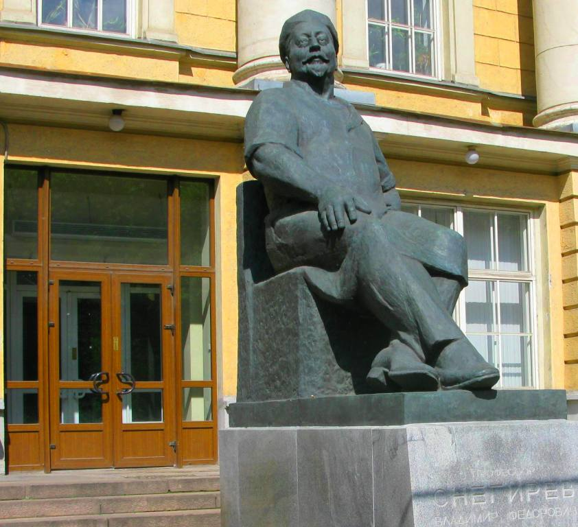 В.Ф. Снегирёв на Б.Пироговская ул., Moscow, Russia.